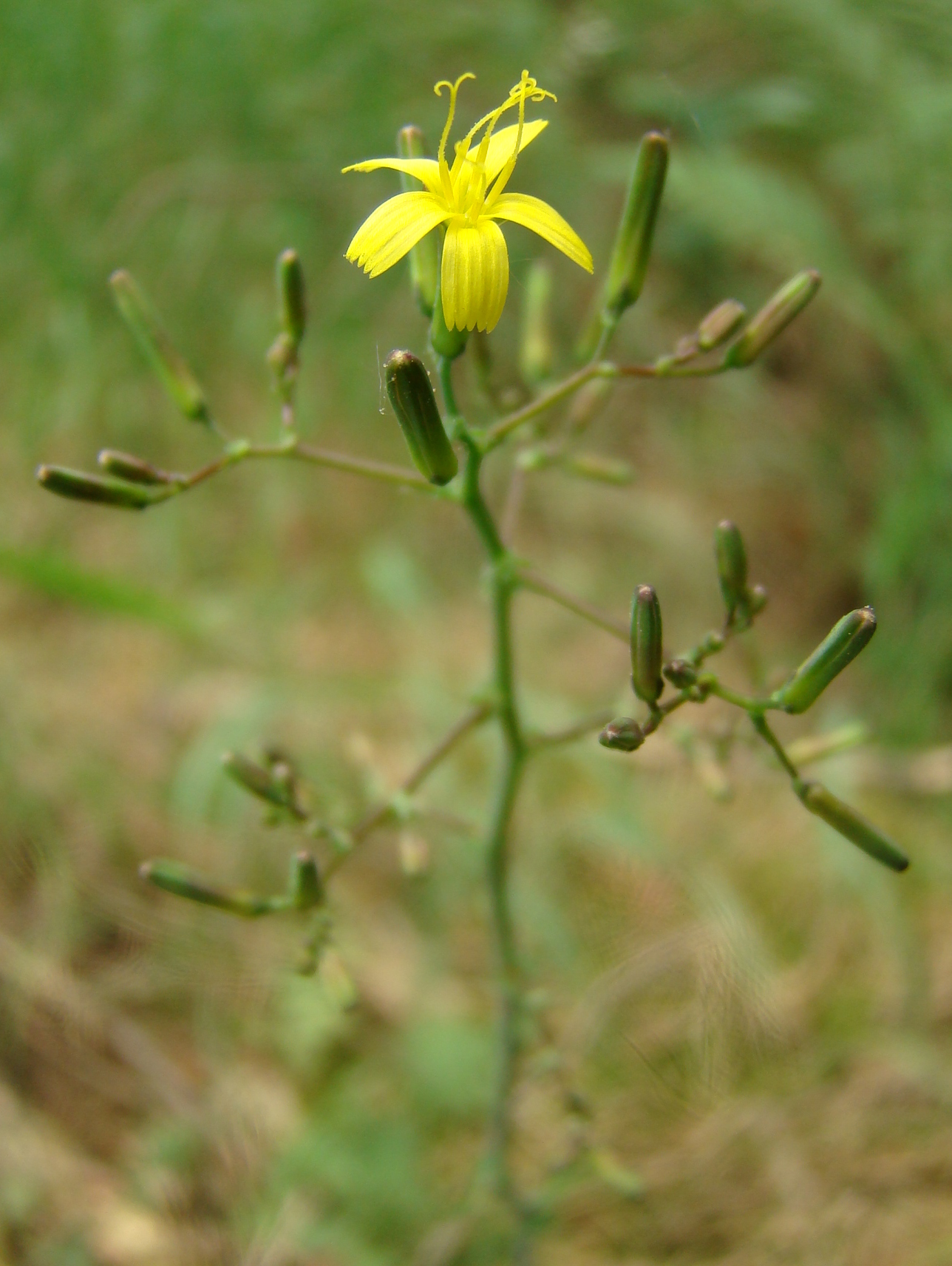 Sałatnik leśny (Mycelis muralis)